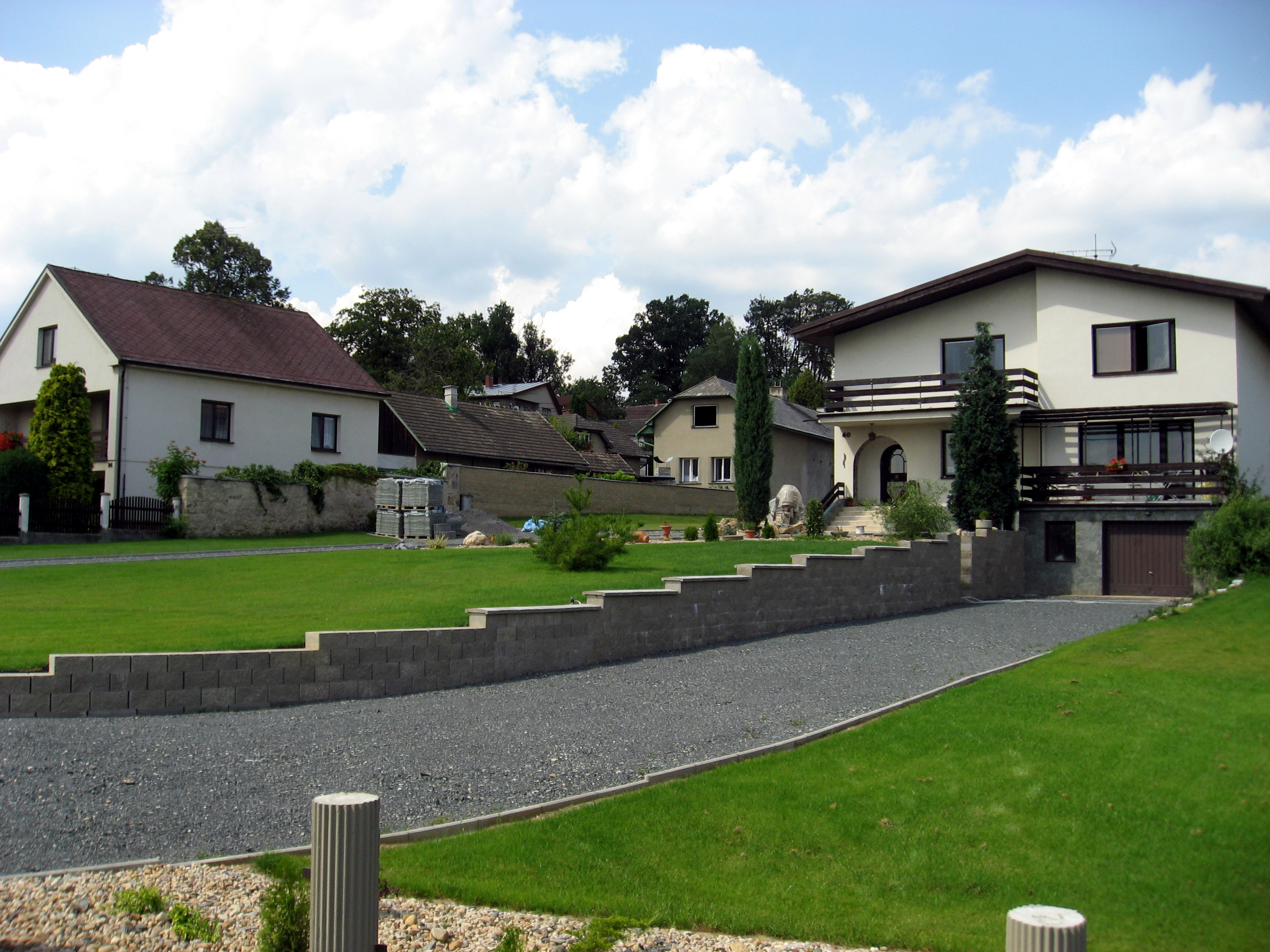 Ostrov